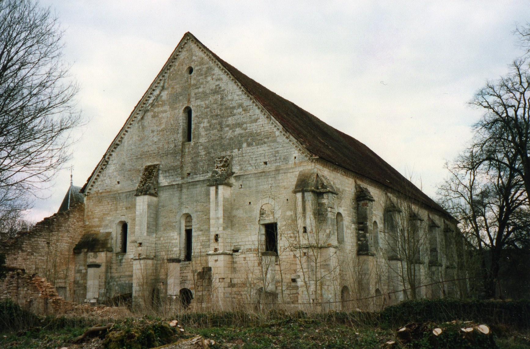 Bâtiment des convers de l'abbaye de Longuay (Haute-Marne)